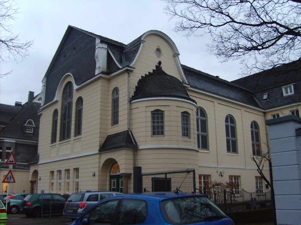 Ehemaliges Gemeindehaus am Platz der Republik, Wuppertal-Elberfeld